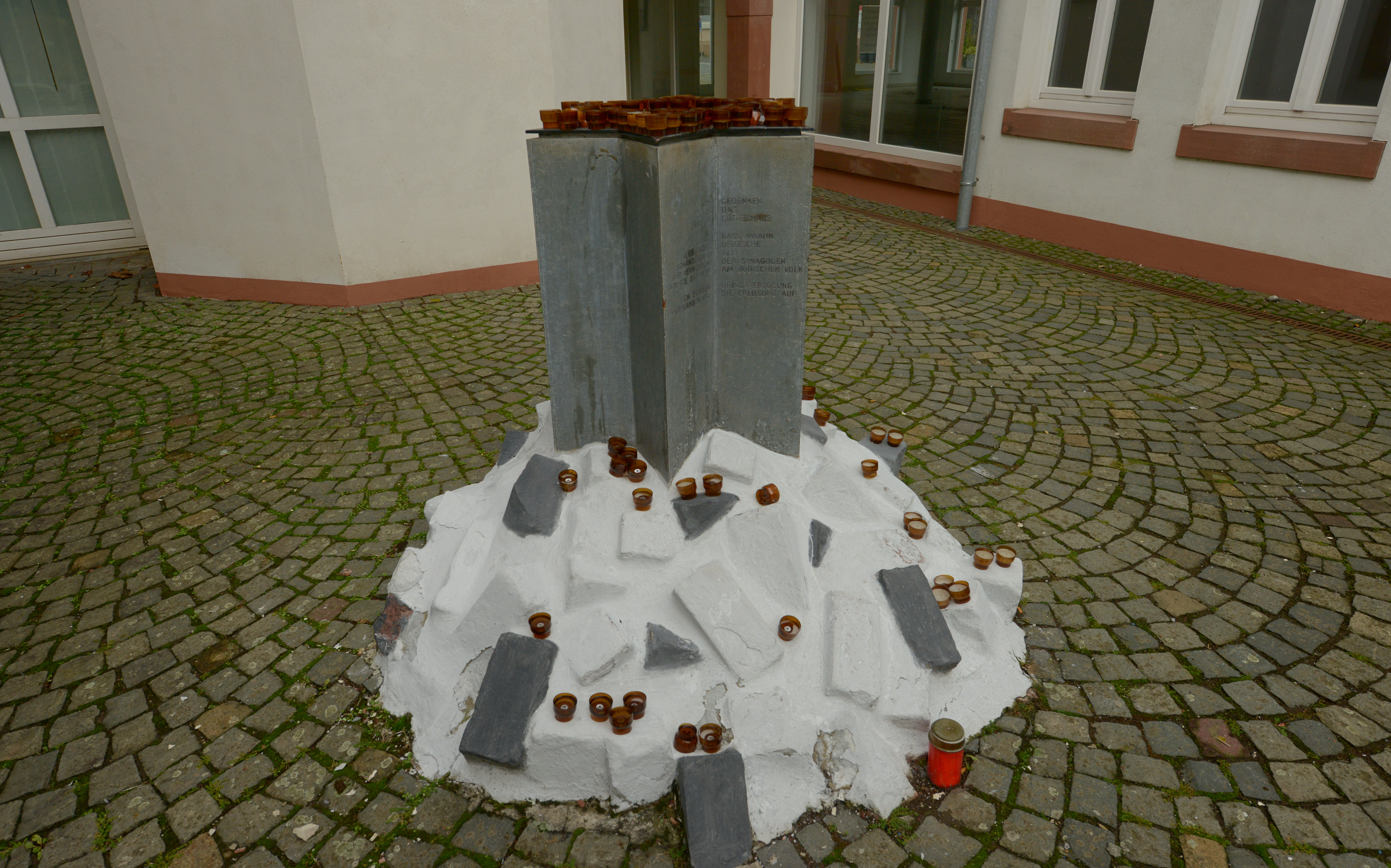 Das Mahnmal erinnert an die jüdischen Opfer der Verfolgung durch die Nationalsozialisten. Die Kerzen auf dem Mahnmal wurden anlässlich einer Gedenkfeier am 9. November 2018 angezündet. Standort: Fornaro-Hof in Ottweiler, Saarland/ Deutschland. Die Inschrift lautet: Zum Gedenken an das jüdische Gotteshaus/ Vom Rassenwahn verblendete Deutsche schändeten es 1938/ Der Vernichtung der Synagogen folgte der Mord am jüdischen Volk/ Sich erinnern bringt Erlösung Verdrängen hält die Erlösung auf